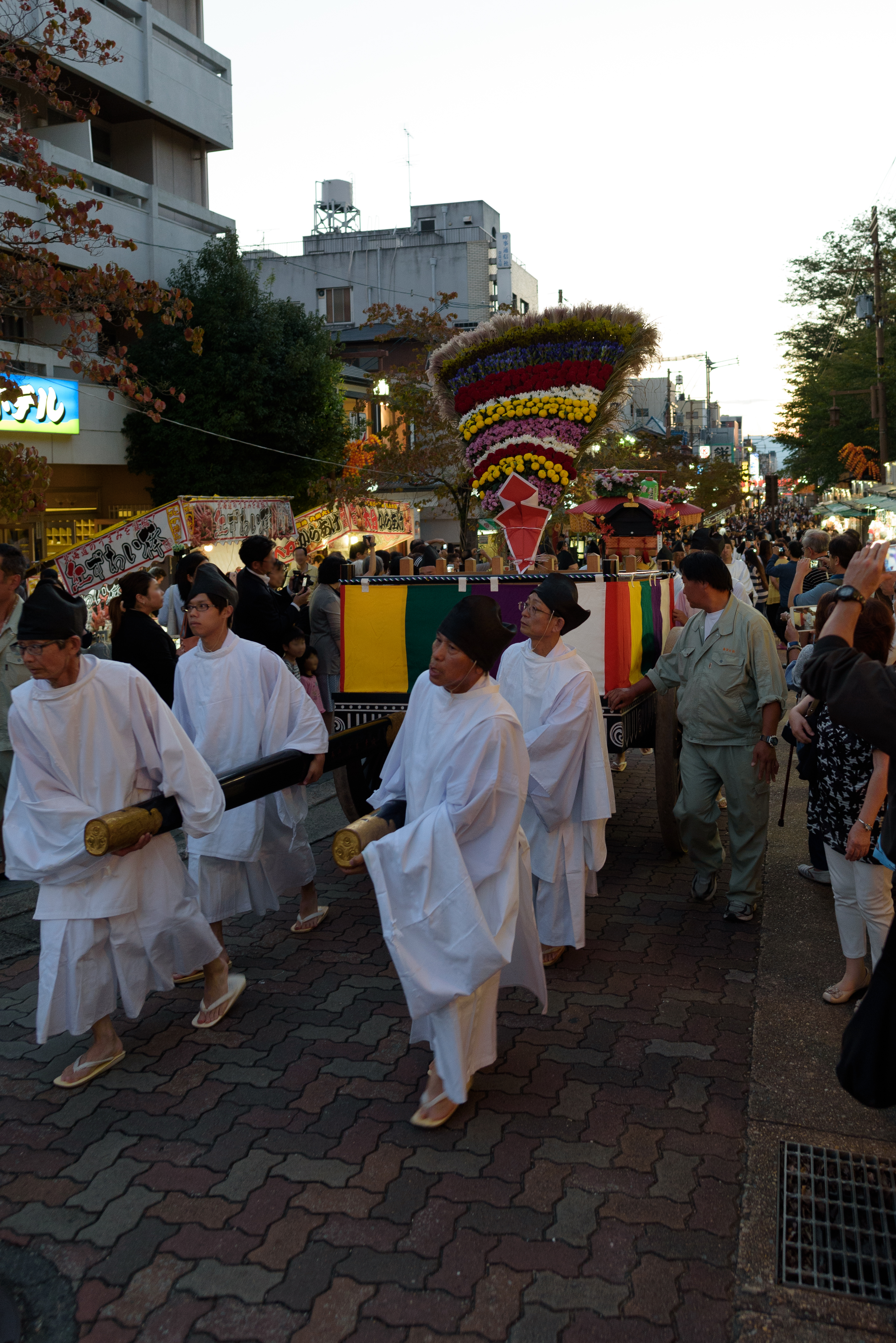 采女祭にて三条通りを練り歩く花扇奉納行列